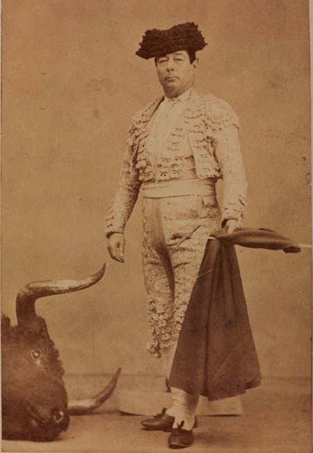 Juan Laurent, Cúchares, papel albúmina; 93 x 57 mm, sobre tarjeta 102 x 60 mm (carte de visite). Impreso al verso, escudo real y a continuación: "J. Laurent./FOTOGRAFO DE S.M. LA REINA/y de S.S. A.A. R.R. los/SS. INFANTES DE ESPAÑA/39. Carrera de S. Gerónimo/MADRID". Mención de responsabilidad impresa al pie de la imagen en el soporte secundario: "J. Laurent Fotog. Signatura: BNE 17/222/136